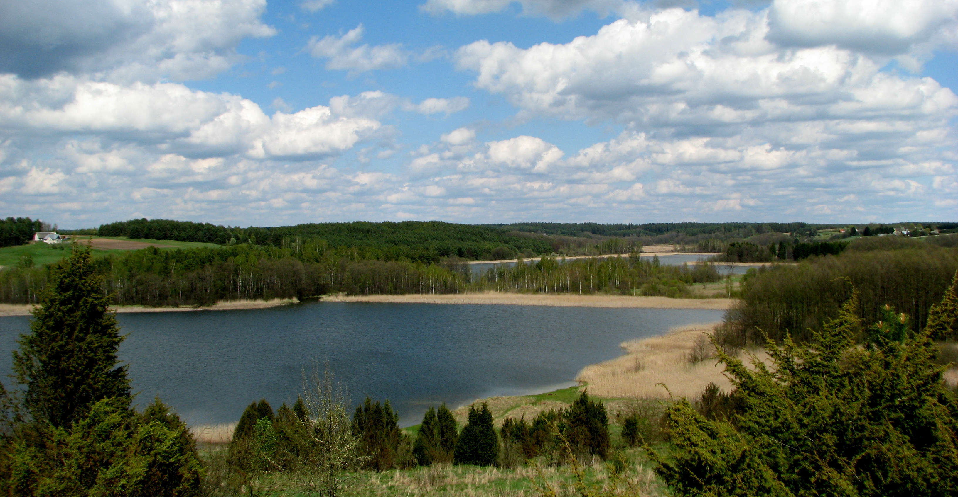 Vilkokšnio ežeras prie Grendavės